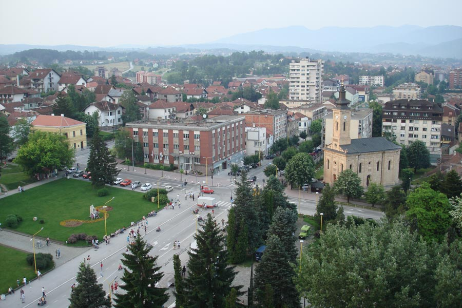 Поглед на Горњи Милановац.